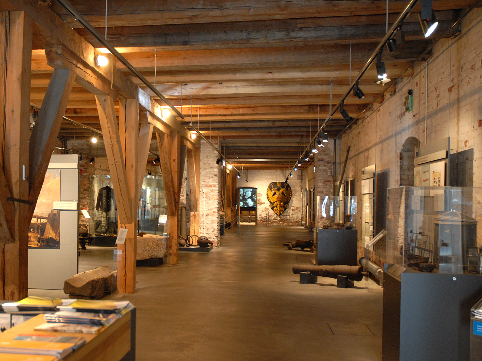 Le musée de Suomenlinna La forteresse Suomenlinna (Sveaborg en suédois) a été construite en 1750 à l'époque de la domination du territoire finlandais par la Suède. Sa construction a été effectuée sous l'autorité d'Augustin Ehrensvärd. Elle devait renforcer les défenses de la Suède vis à vis de la Russie qui avait construit la citadelle de Kronstadt pour protéger Saint-Pétersbourg. En 1808, la Russie a annexé la Finlande, en en faisant un Grand-Duché et l'armée russe s'y est installée jusqu'à la chute du tsarisme. En 1917, la Finlande devient indépendante et reprend ses droits sur son territoire. L'armée a quitté Suomenlinna en 1973 et le site a été classé au patrimoine mondial par l'UNESCO.